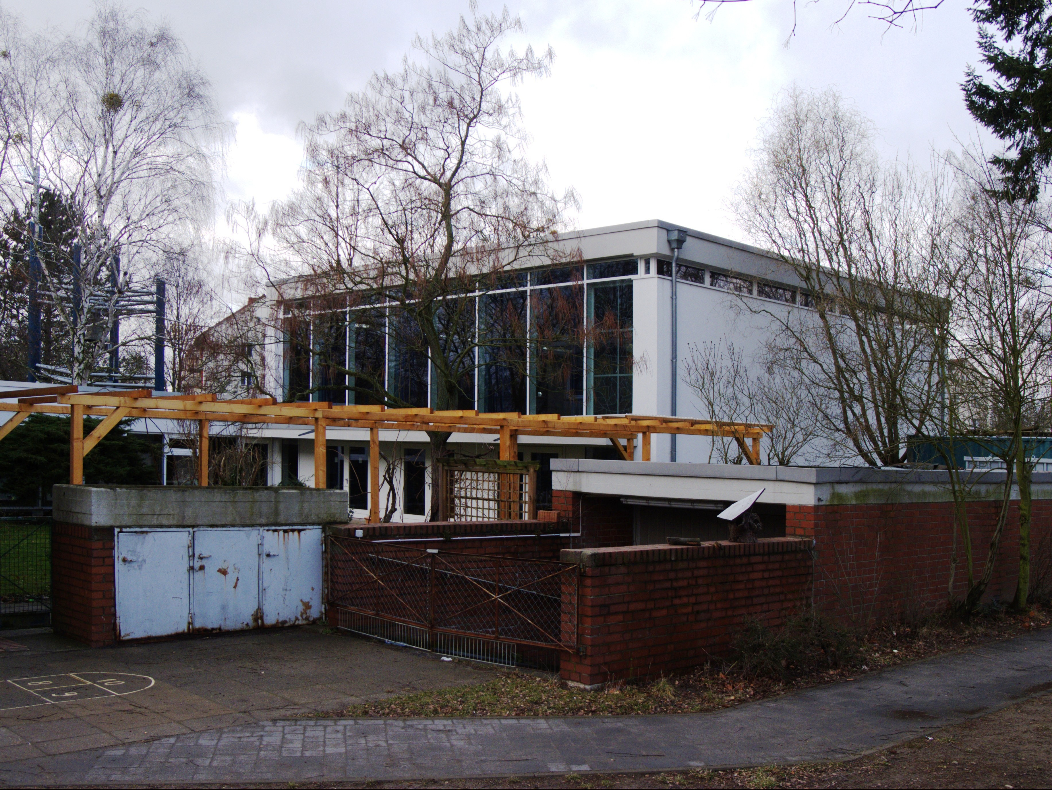 Kirchsaal des Gemeindezentrums